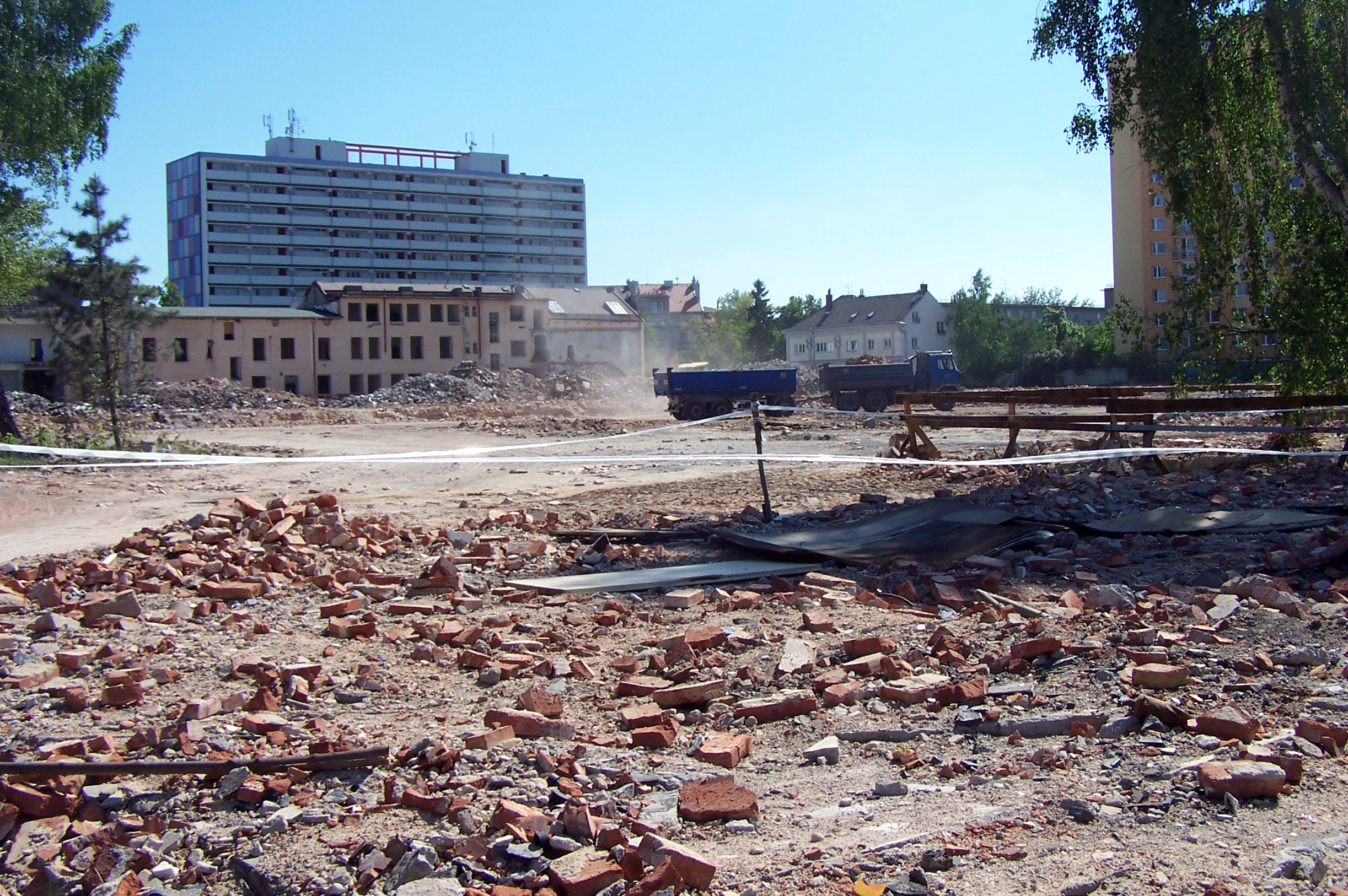 Likvidace továrny na mlýnské stroje Josefa Prokopa synové na Palackého třídě. Loc: 50°2'12.185"N, 15°45'51.448"E